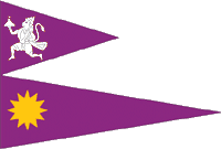 Summary Drapeau de la principauté d'Ajaigarh Source Nataraja Statut Nataraja Catégorie:Drapeau de principauté des Indes